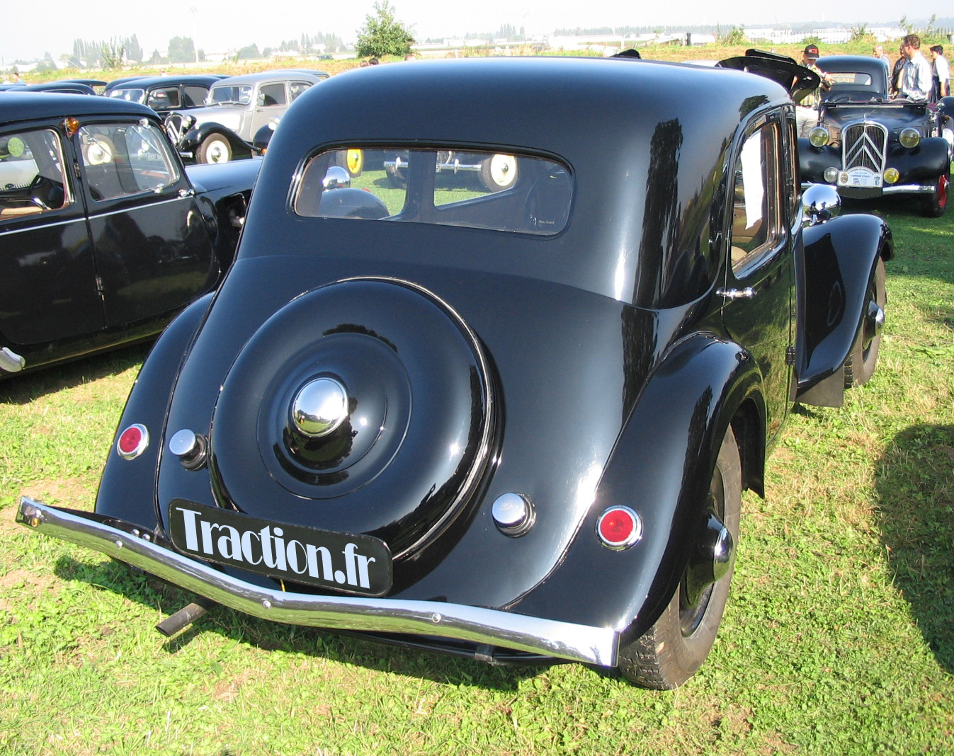 Citroën Traction Avant modéle 7A de 1934 à malle borgne